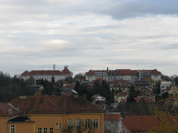 Pogled na KBC Zagreb s Gornjeg grada